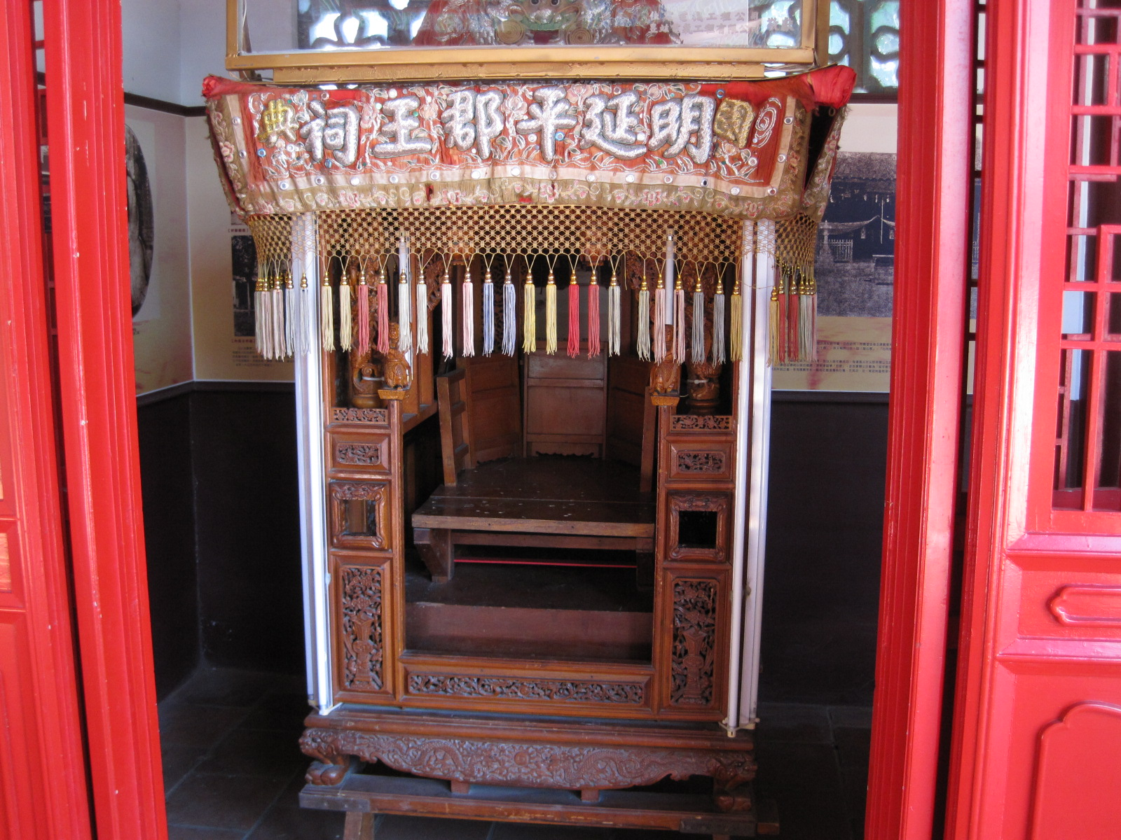 延平郡王祠神轎